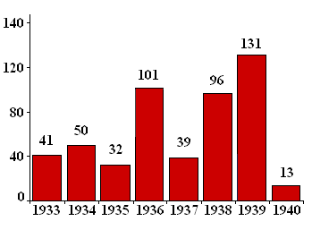 Любомир Таушанов, 2006 г.